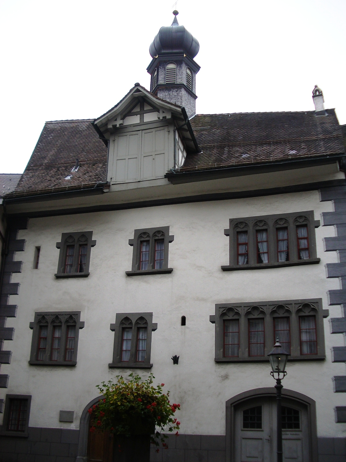 Lichtensteig SG, Switzerland